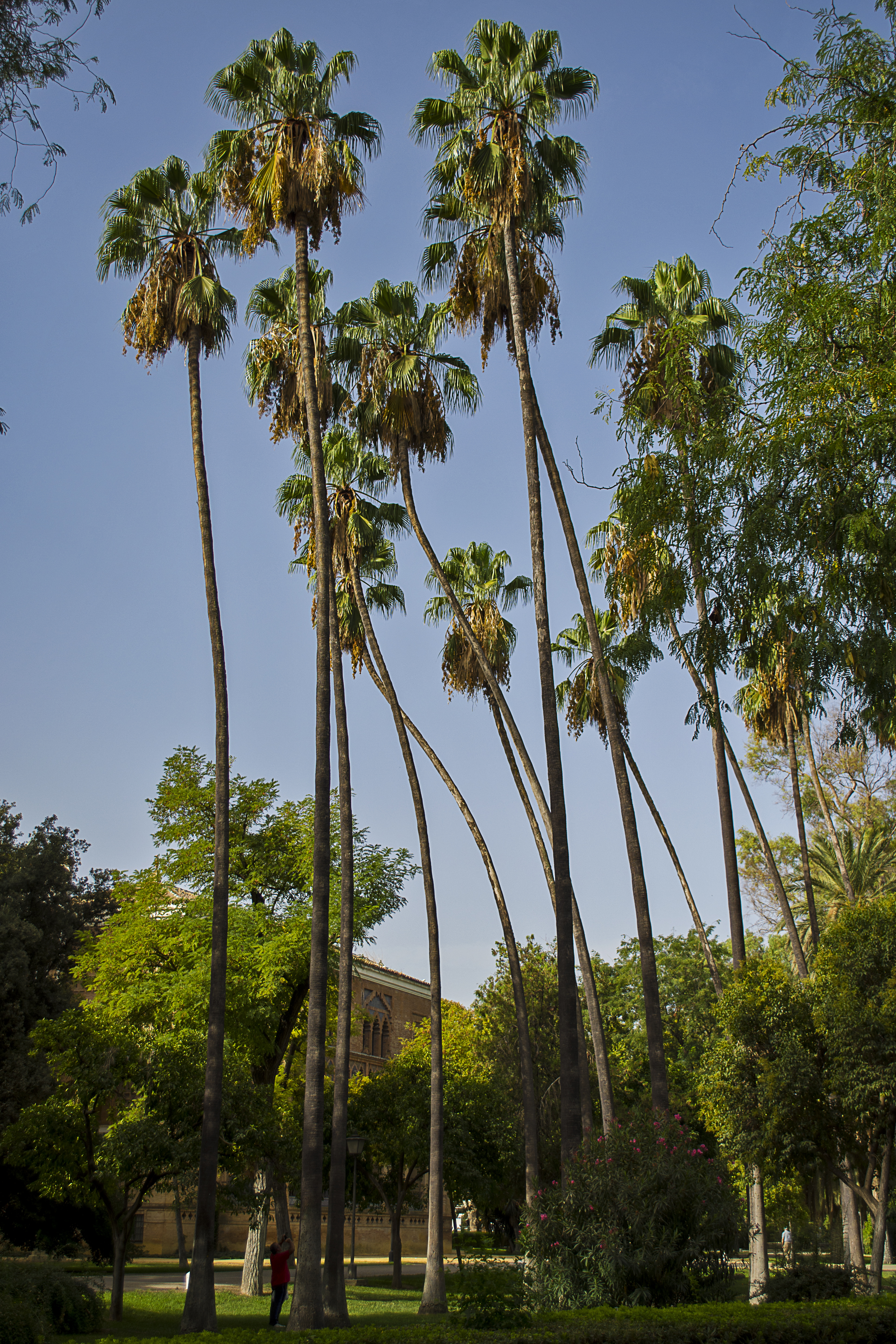 Palmeras del parque María Luisa. (Sevilla)